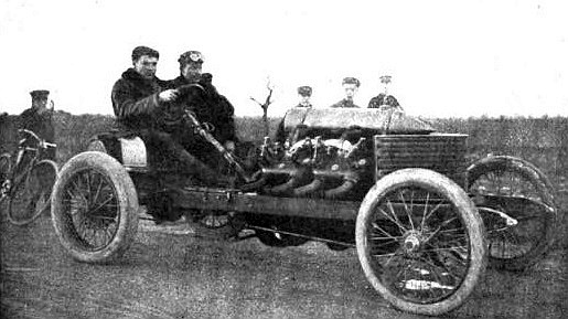 Victor Hémery entre Salon et Arles le 30 décembre 1905 sur Darracq 200 hp 8 cylindres en V Special de 990kg (RM, au kilomètre en 20" 3/5e), Histoire de l'automobile, Pierre Souvestre, éd. H. Dunod et E. Pinat, 1907 (ASIN B001BPBE58) p.701